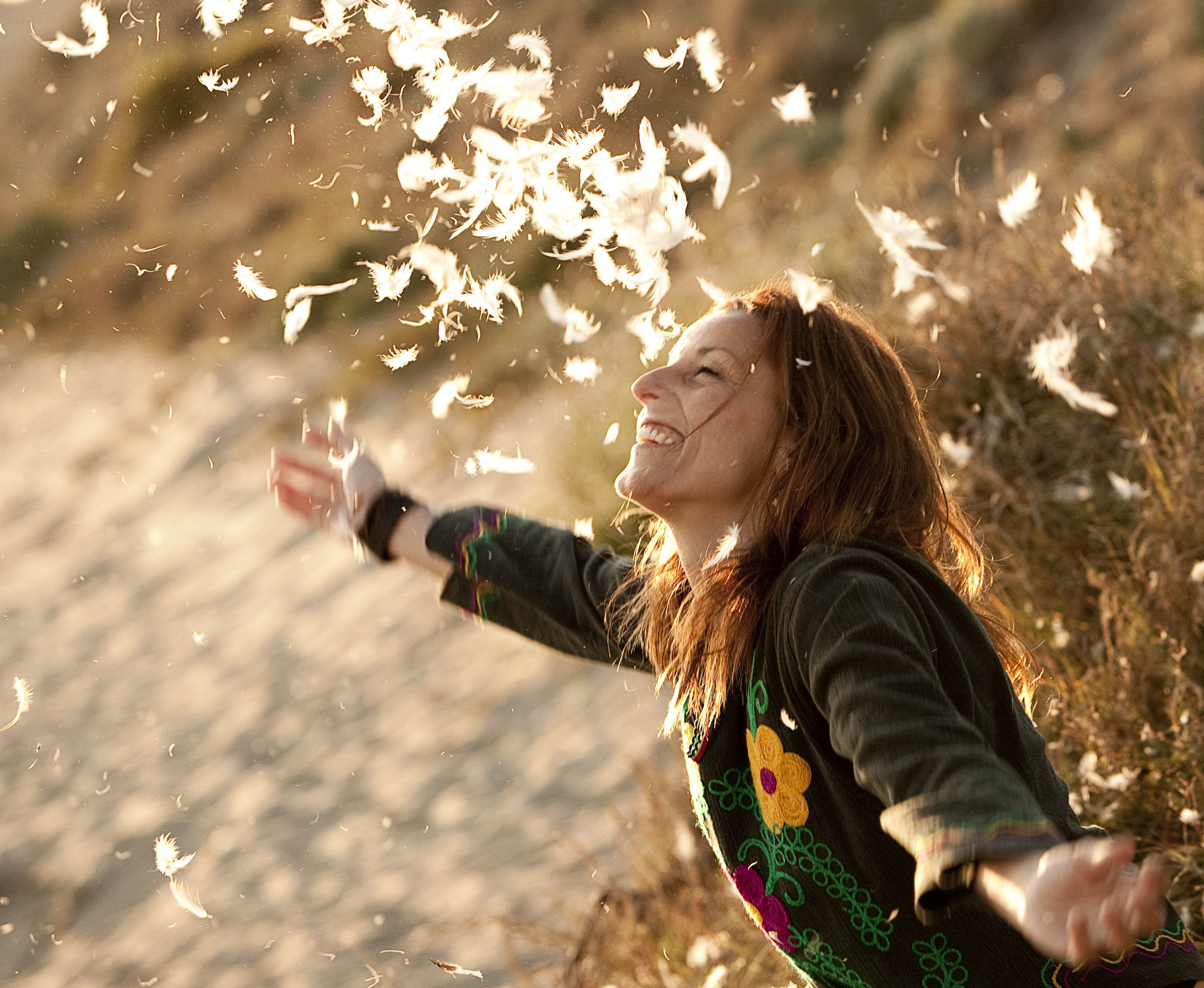 Lamari de Chambao en la playa